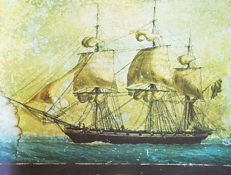 Navire « Navéta » appartenant à Ghikas Bottasis de Spetsès. Converti en brûlot en 1825.